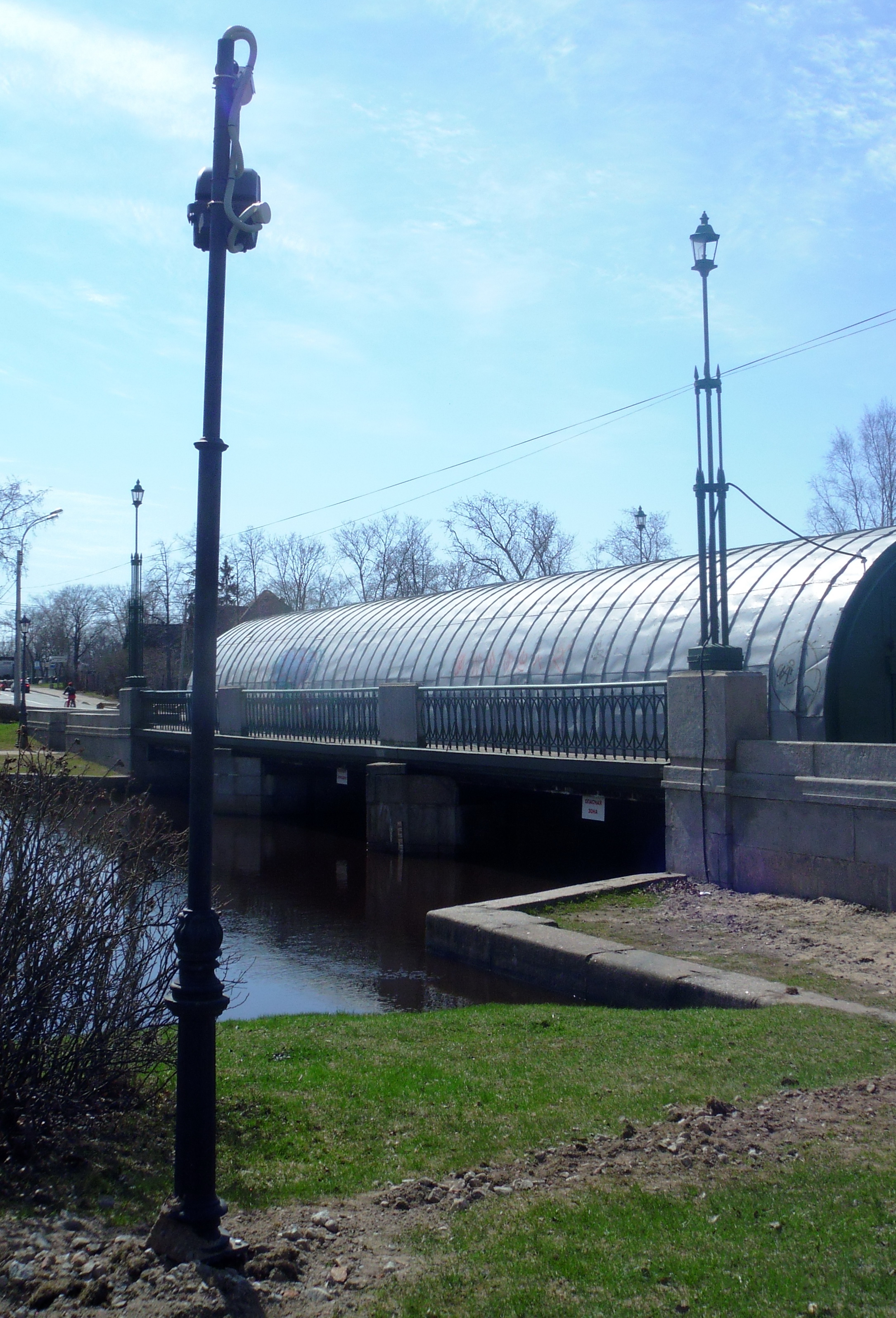 Сестрорецкий Разлив. СПб. Камера видеонаблюдения на плотине Гаусмана